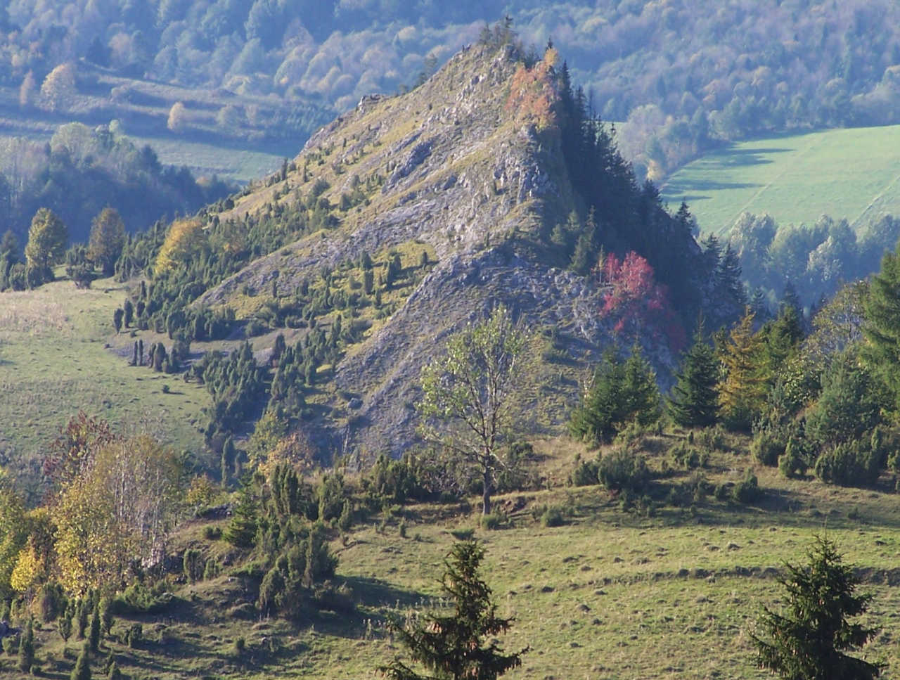 Rezerwat Biała Woda (Pieniny)